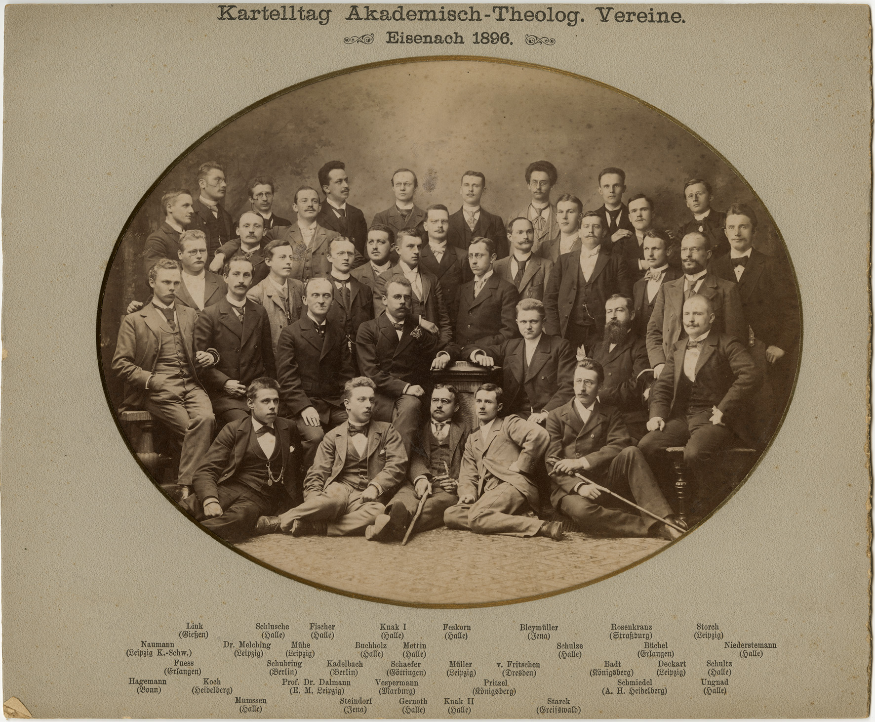 Kartelltag Akademisch-Theologische Vereine in Eisenach 1896, aus Bestand: AEKR Düsseldorf 8 SL 046 (Bildarchiv), 024_00032